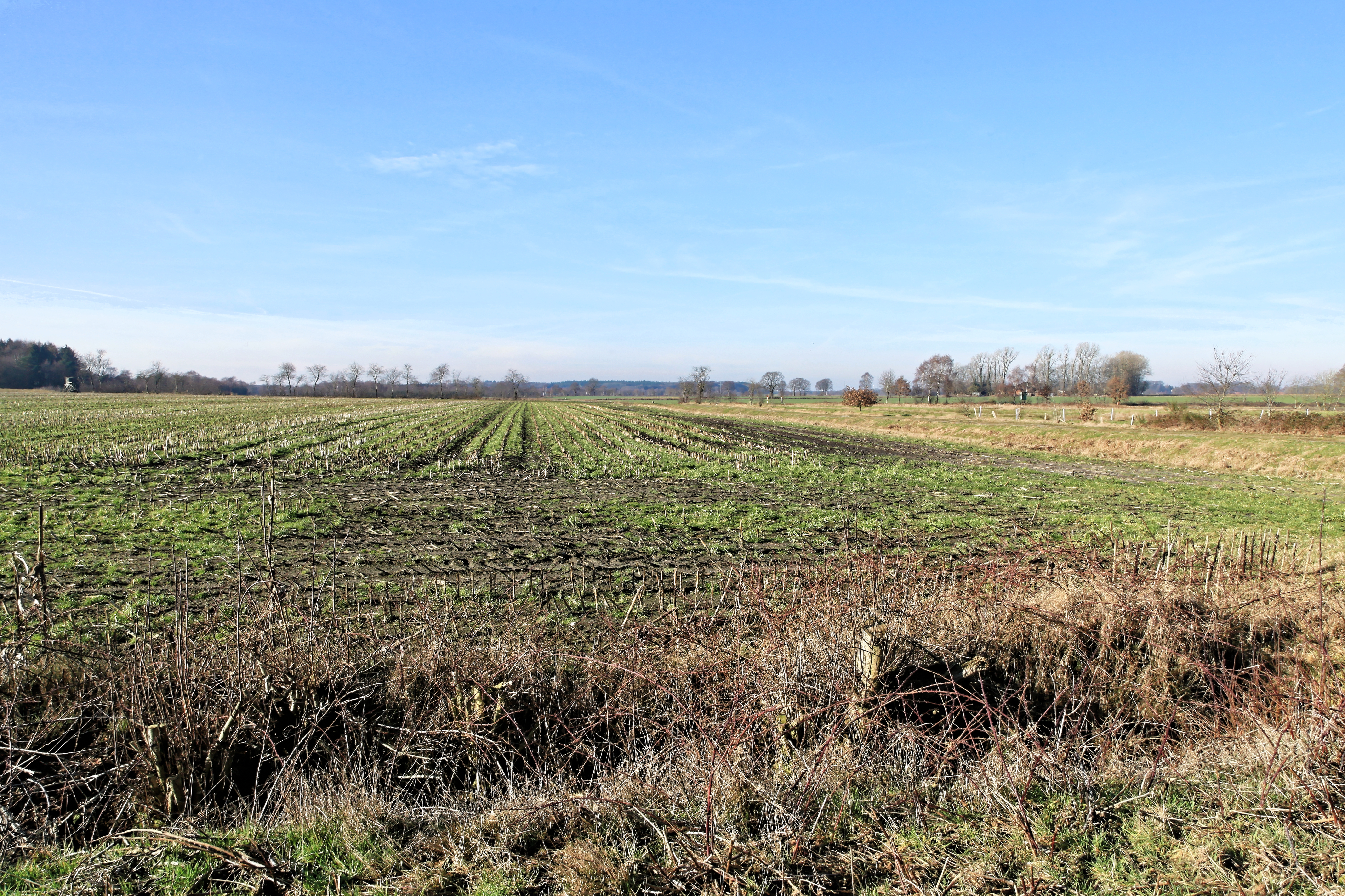 NSG Moorwiesen am Theikenmeer in Spahnharrenstätte